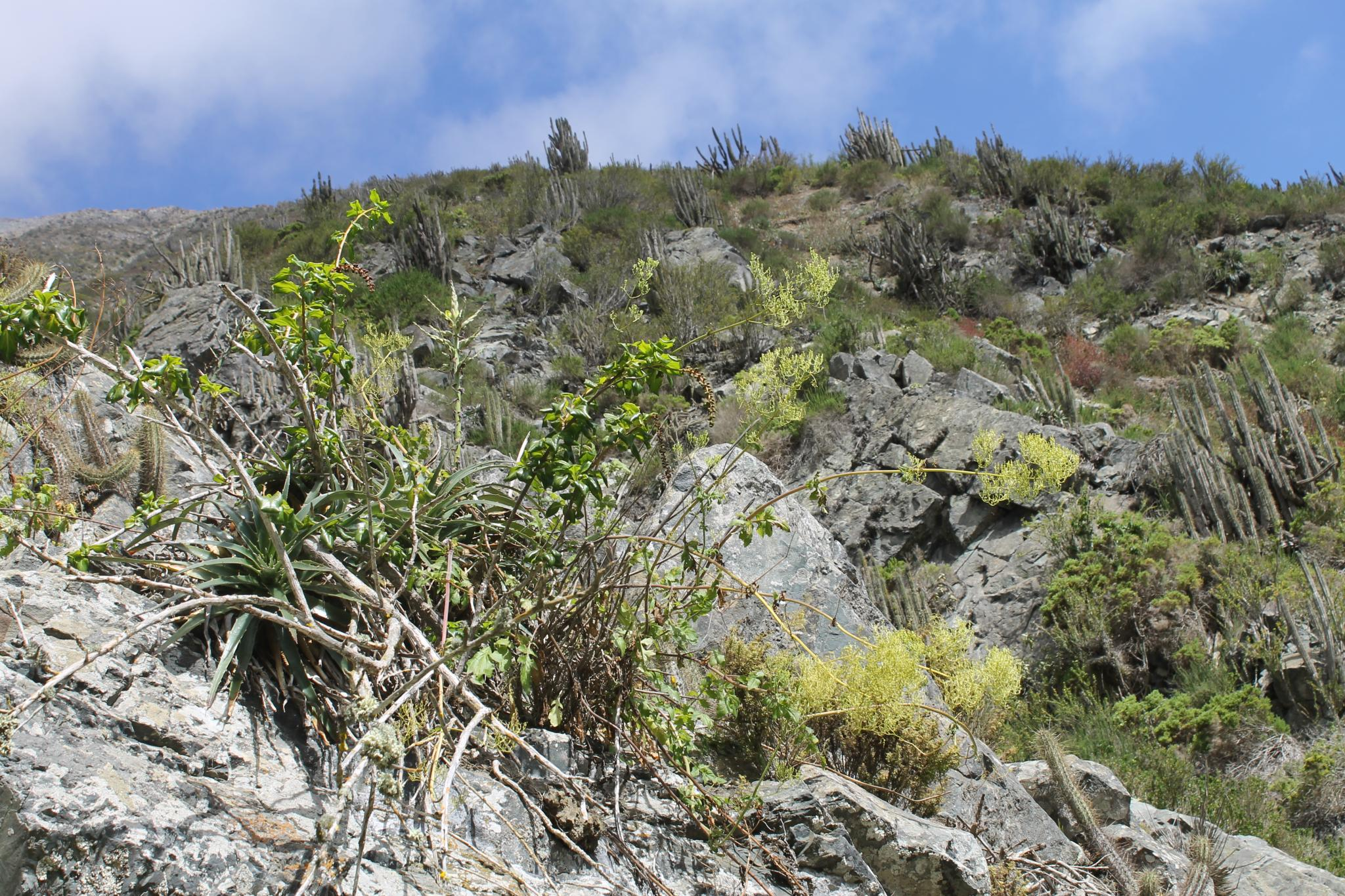 Quebrada El Medano, Paposo